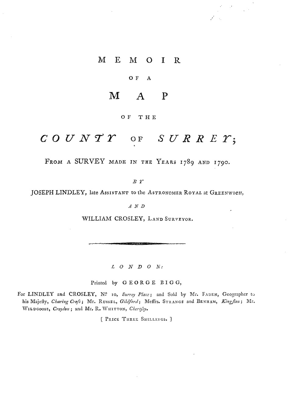 Joseph Lindley, William Crosley: Memoir of a map of the County of Surrey, from a survey made in the years 1789 and 1790 by Joseph Lindley , late assistant to the Astronomer Royal at Greenwich, and William Crosley, land surveyor. London : Printed by George Bigg, for Lindley and Crosley, No. 10, Surrey place; and sold by Mr. Faden, geographer to His Majesty, Charing Cross; Mr. Russel, Gildsord; Messrs. Strange and Banham, Kingston; Mr. Wildgoose, Croydon; and Mr. R. Whitton, Chertisey, [1793]